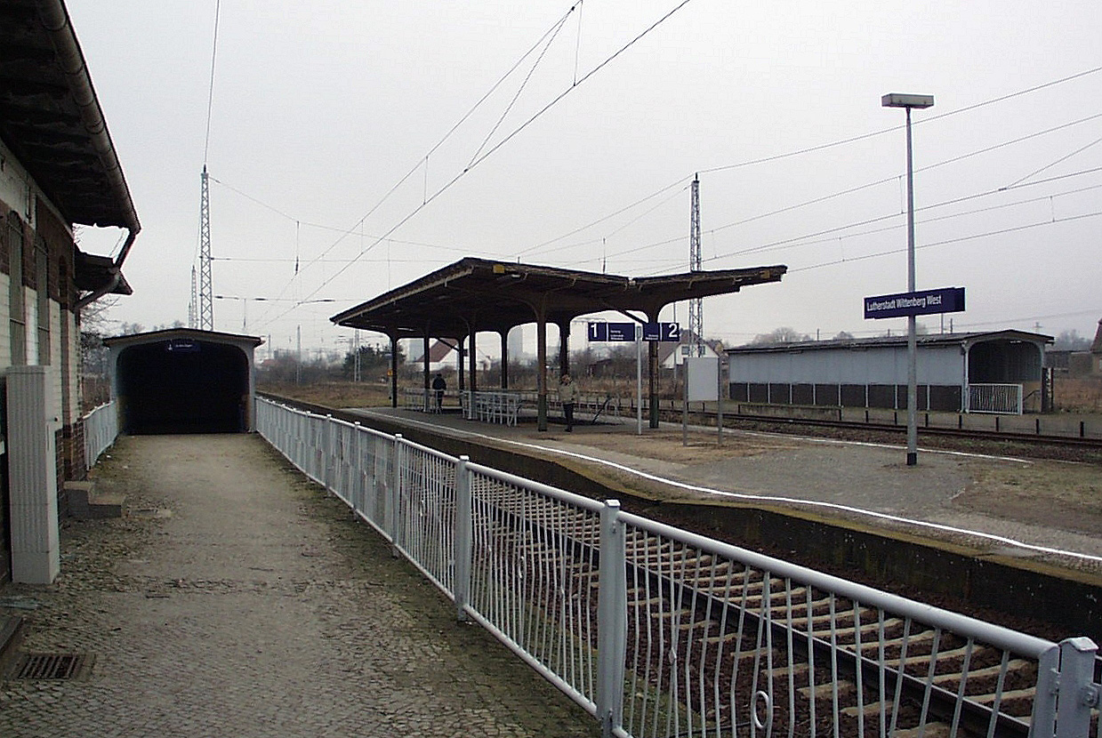 Bahnhof Lutherstadt Wittenberg-West an der Bahnstrecke Wittenberg-Roßlau in Sachsen-Anhalt, Deutschland